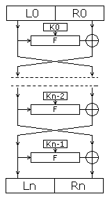 Сеть Фейстеля(шифрование)